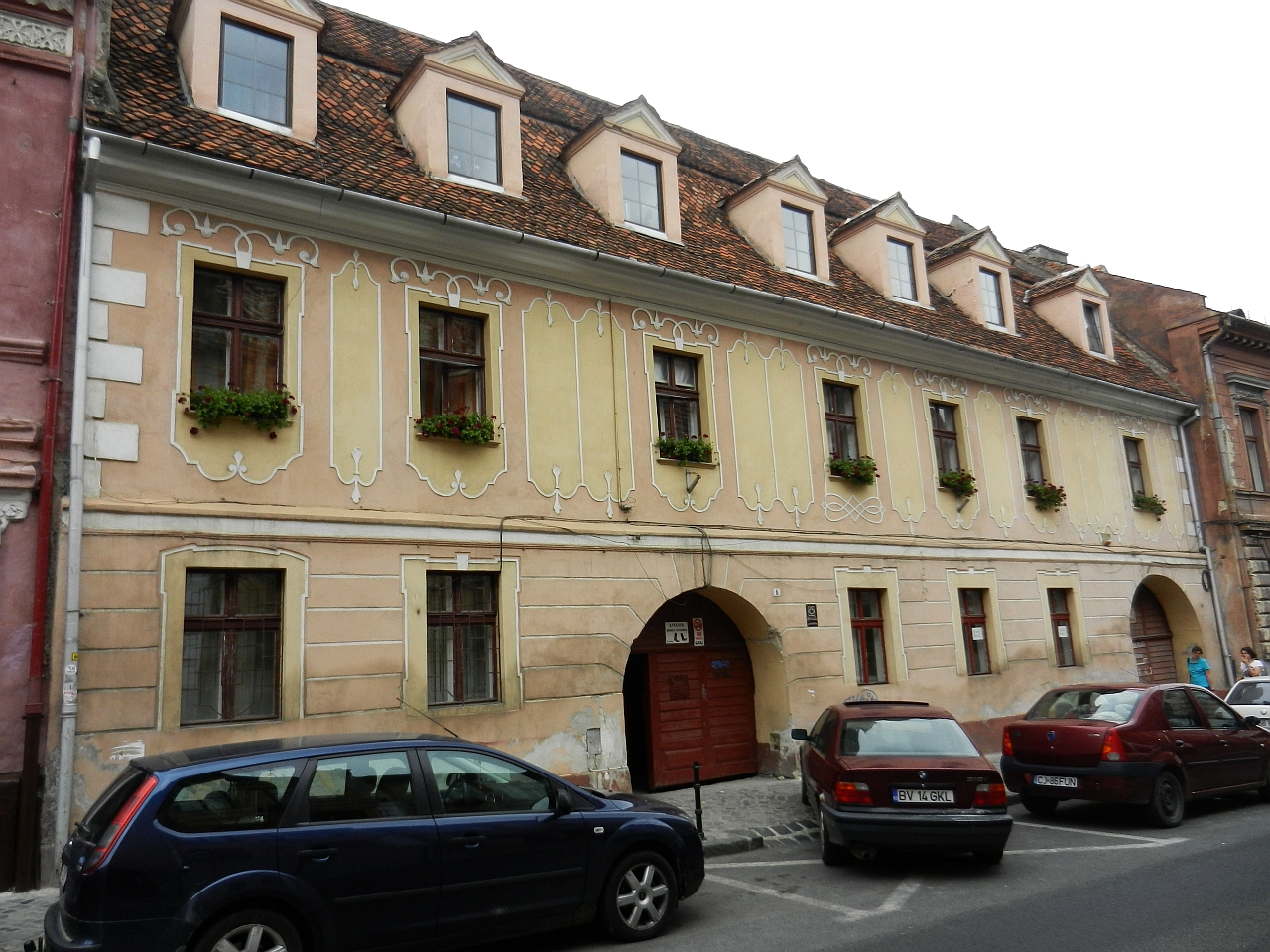 Casă monument istoric